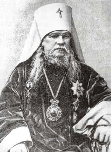 Митрополит Леонтий (Лебединский)